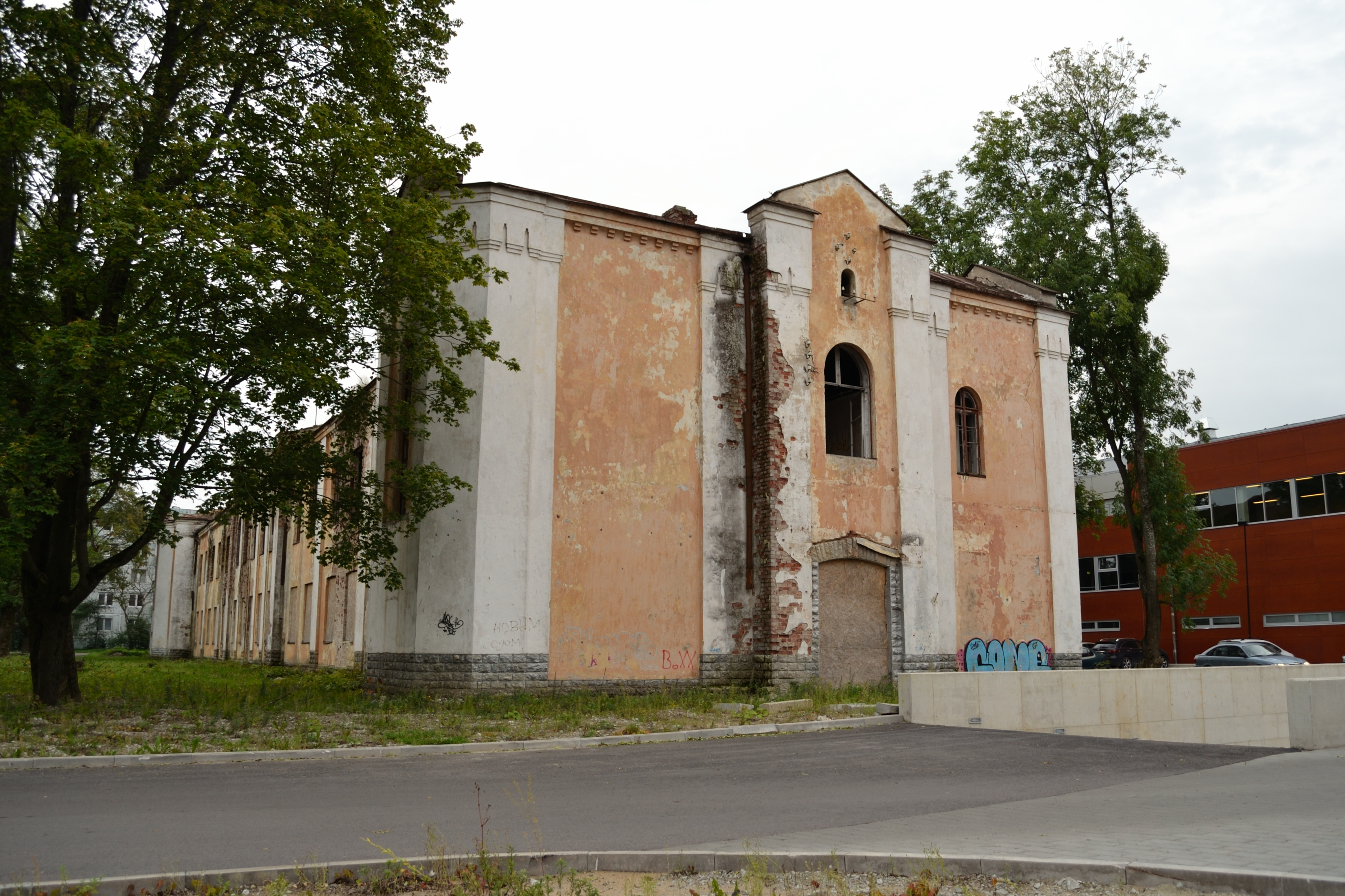 Tondi sõjaväelinnaku klubihoone Tondi 55B, 1915-1916